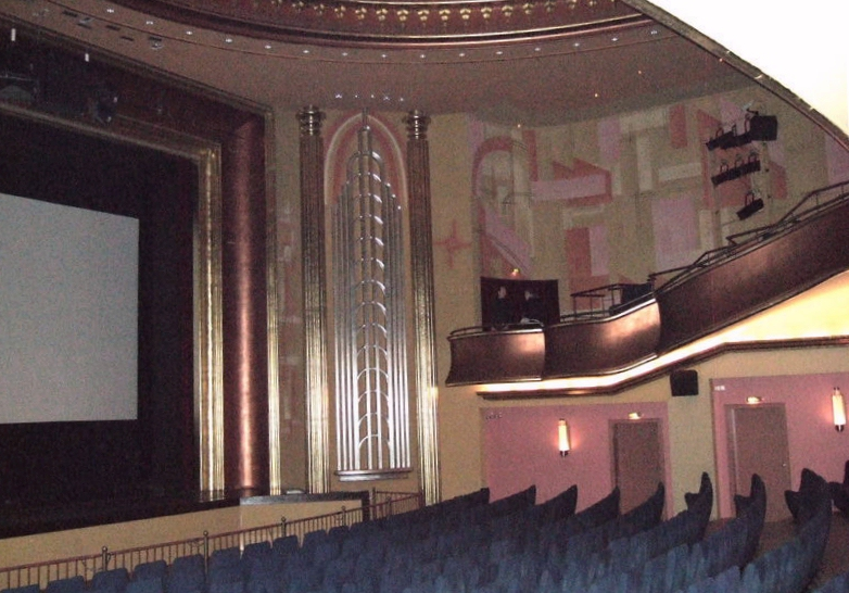 Großer Saal im Kino „Metropol“ in Bonn, Marktplatz; erbaut 1928